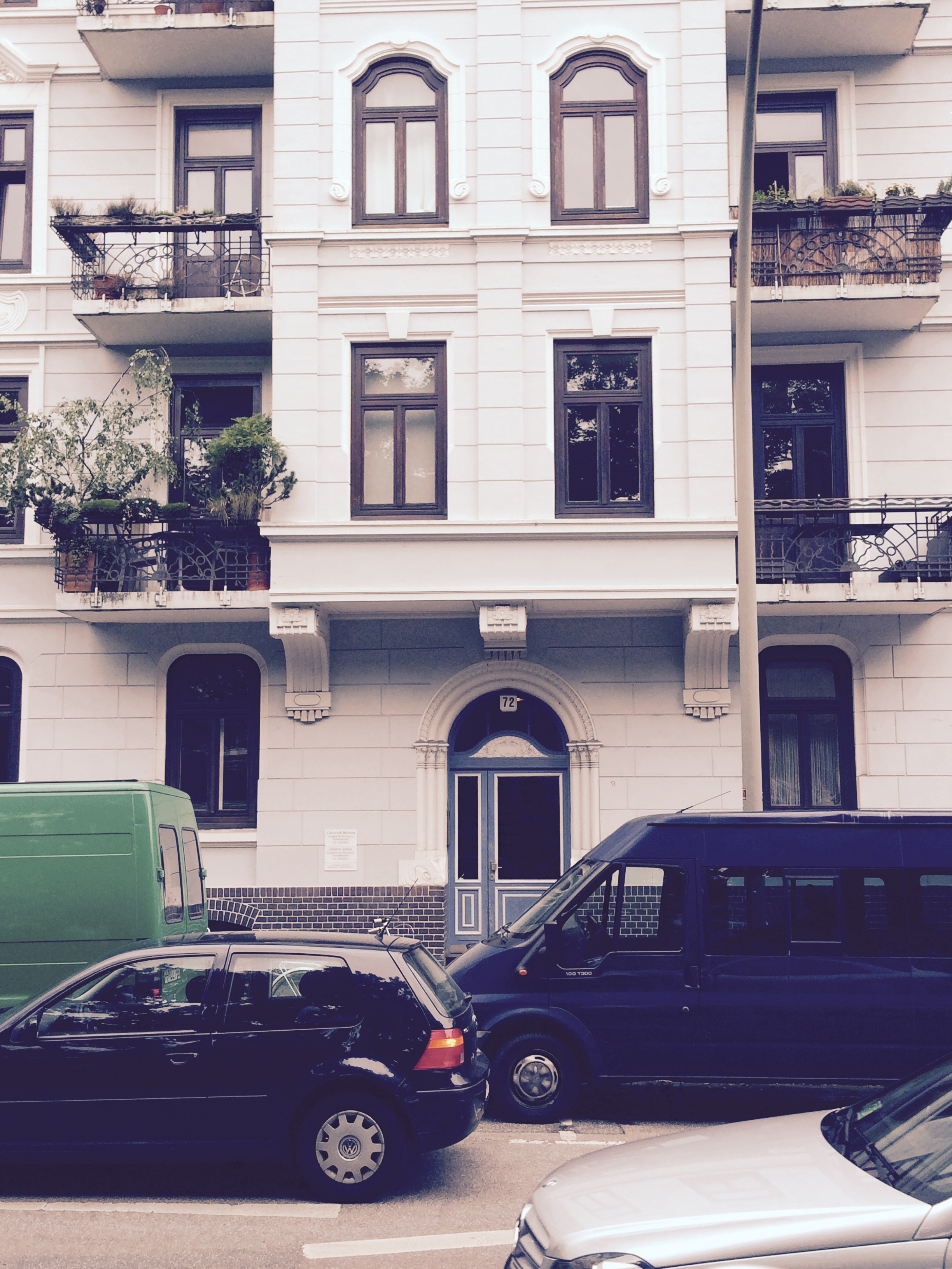 Haus Eulenstraße Nr. 72, Hamburg — Zeitweiliger Redaktionssitz der BOA VISTA, Zeitschrift für Neue Literatur